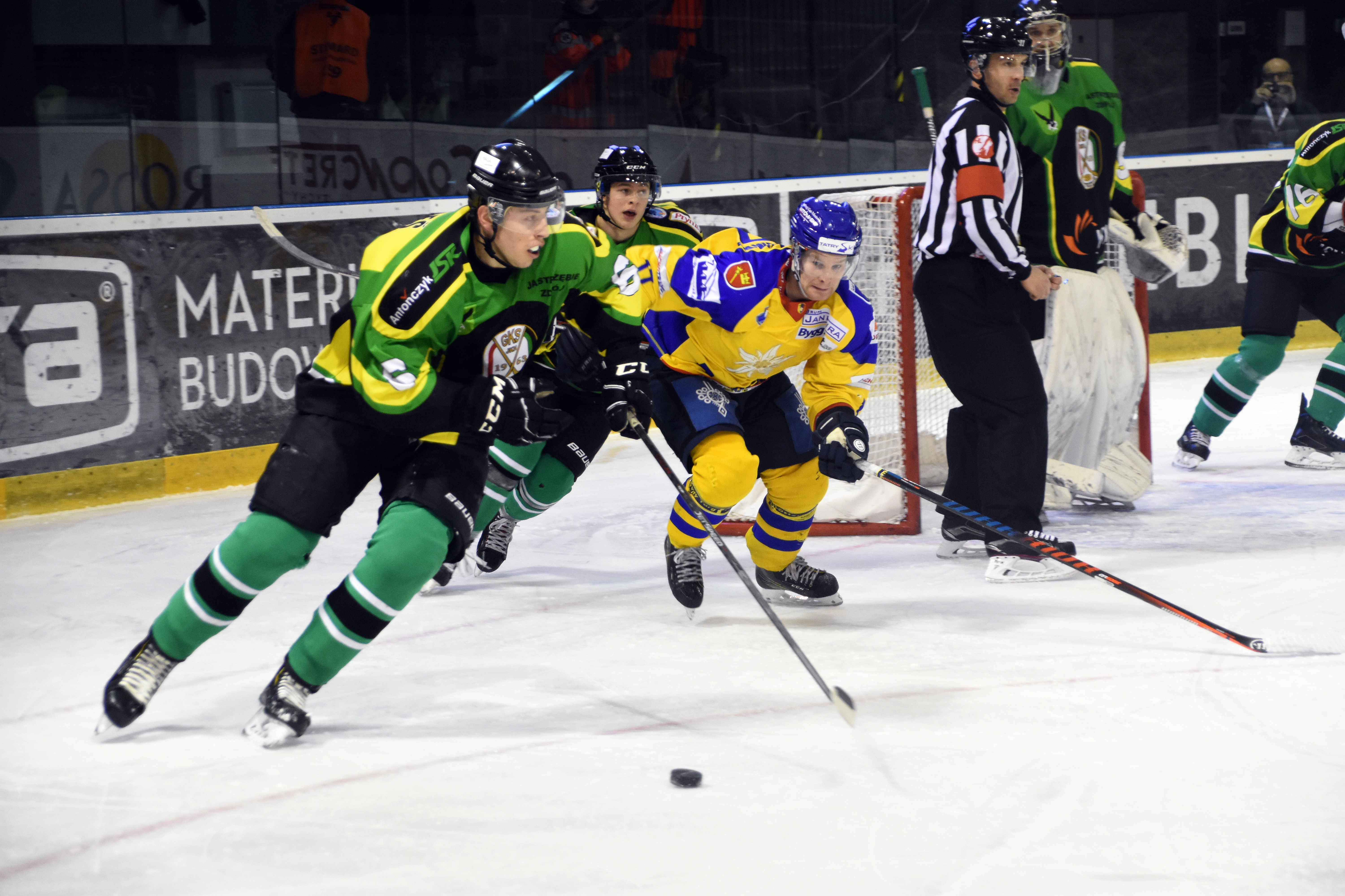 PP JKH Jastrzębie - Podhale Nowy Targ